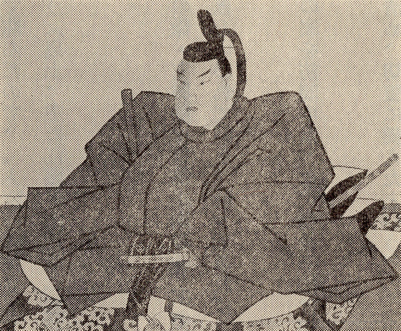 久留島通春の肖像(モノクロ)。